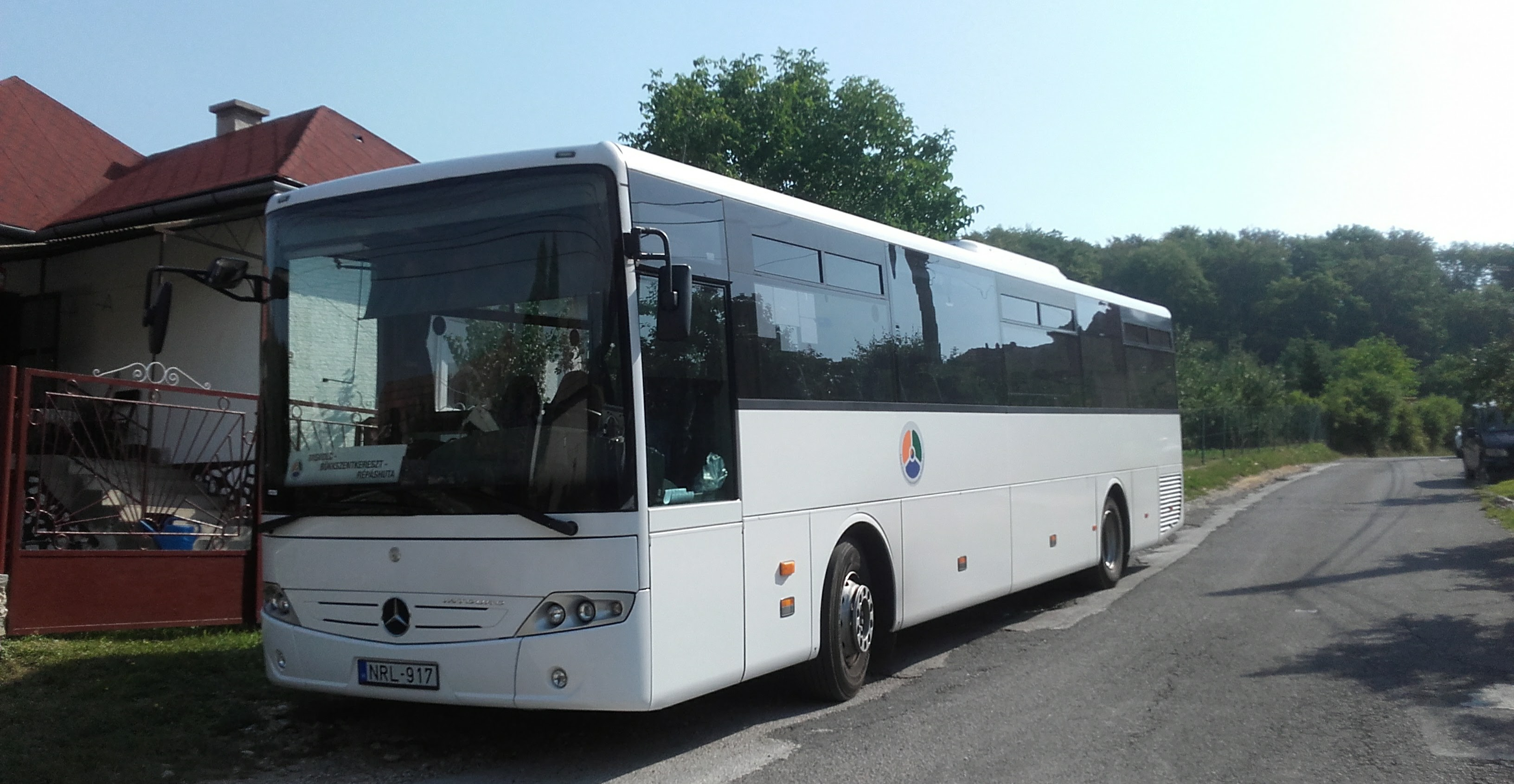 Az ÉMKK NRL-917 rendszámú Mercedes Intouro busza Bükkszentkereszten, a 3755-ös helyközi járaton.